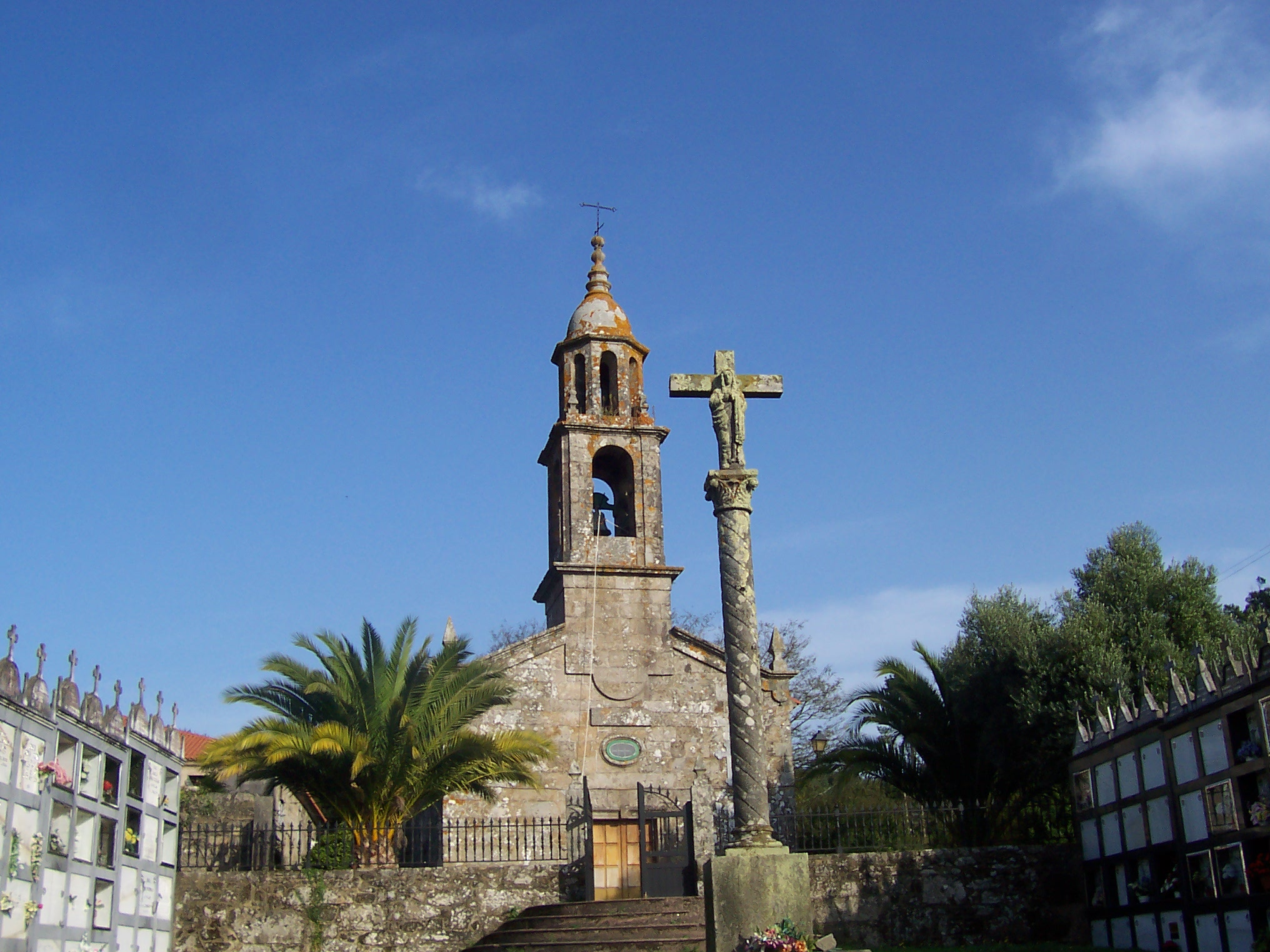 Se ubica en la parroquia de Piñeiro y dispone de planta de cruz latina. La construcción del templo comenzó en 1740 con la capilla mayor y concluyó en 1818 con la edificación de la fachada y de la torre-campanario. Tiene un interesante retablo barroco en su interior. En el cementerio que rodea la iglesia de San Mamede, destaca un crucero con una curiosa figuración. Dispone de una plataforma cuadrangular y varal circular con estrías en espiral y motivos vegetales con capitel. La cruz tiene la imagen de Cristo crucificado con tres clavos y corona de espinas y, por el reverso, la Virgen en actitud de orar con las manos entrelazadas.